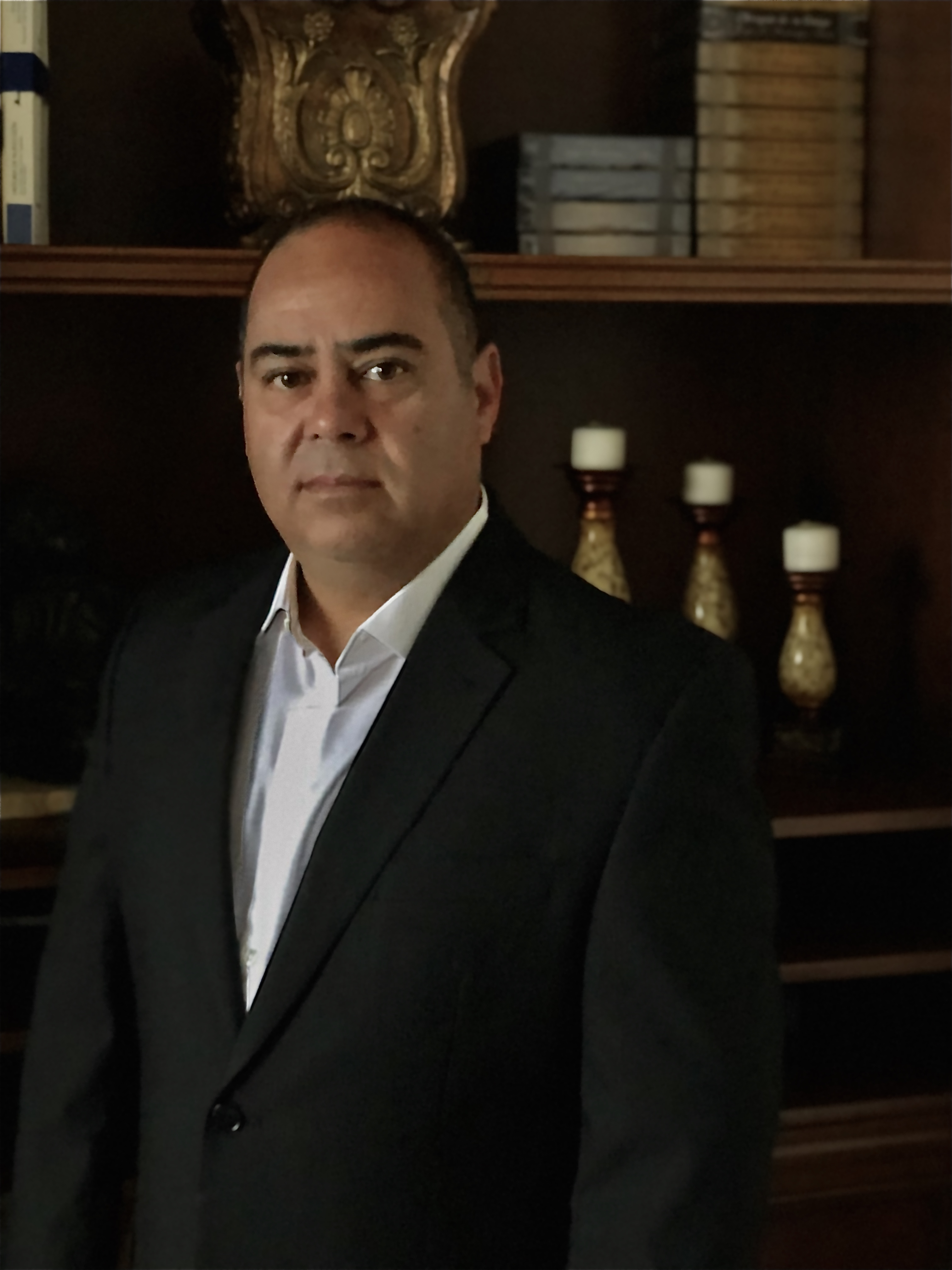 Político mexicano